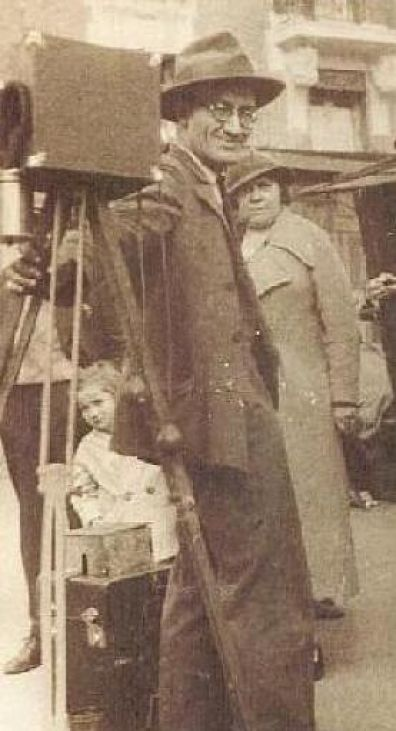 Alexandre Schapiro, sous la fausse identité de Alexandre Tanaroff, sous les pseudonymes de plume de Sacha Piotr ou Sacha Peter, né le 6 août 1890 à Novozybkov (Ukraine) et mort en août 1942 à Auschwitz, est un anarchiste ukrainien. Cette photo a été probablement prise à Berlin où il a exercé son métier de photographe de rue jusqu'à son départ pour Paris en 1933.